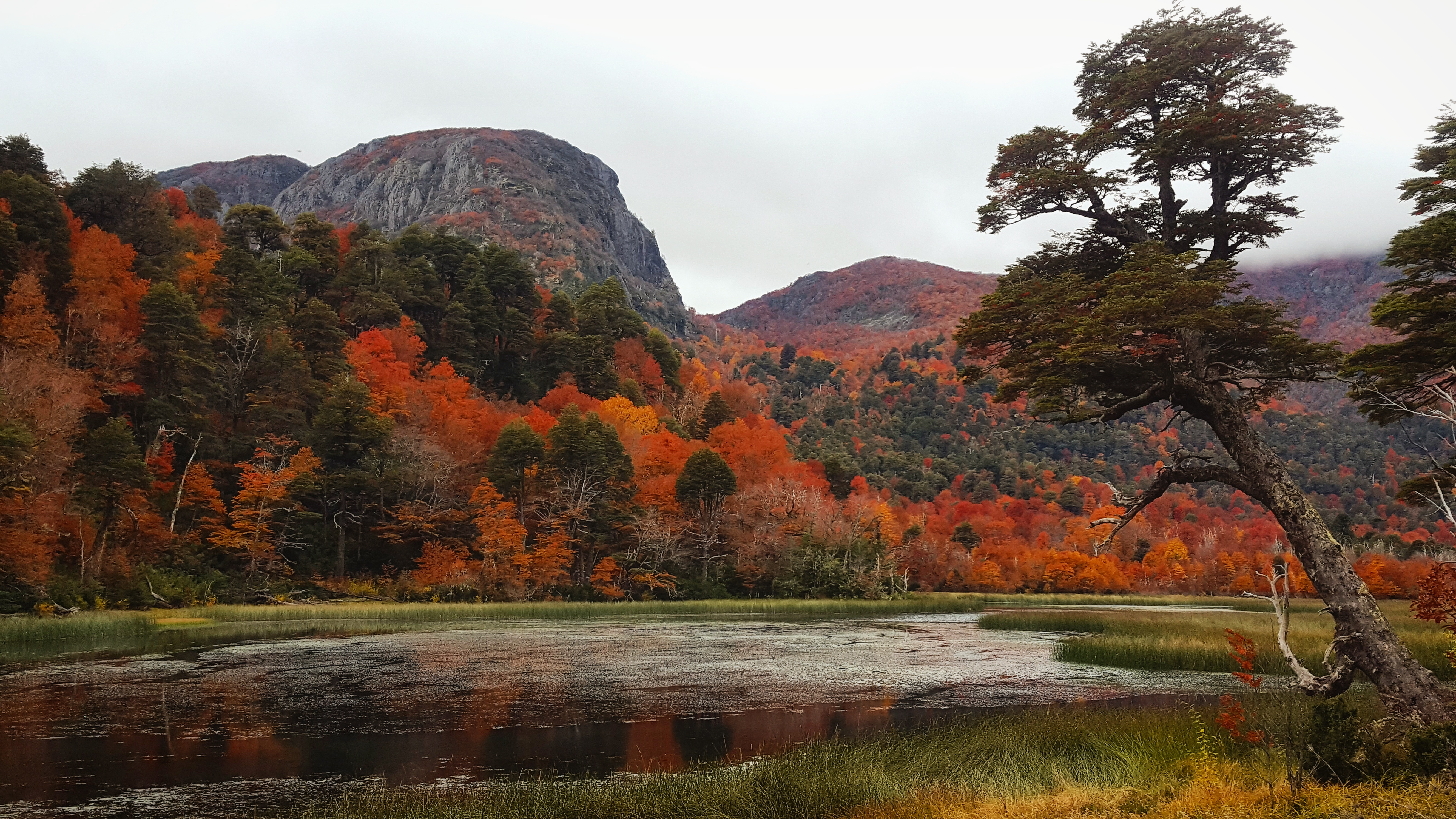 El lago Quillelhue rodeado de los colores del otoño en el Parque Nacional Villarrica